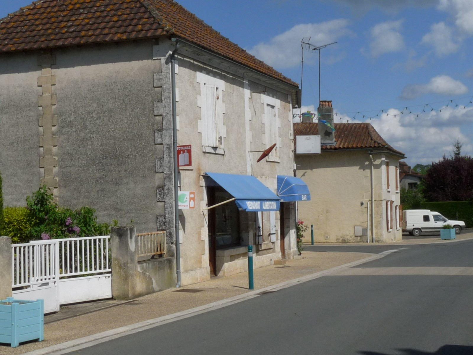 Bar-restaurant-épicerie-presse-pompiste, Saint-Vincent-Jalmoutiers, Dordogne, France